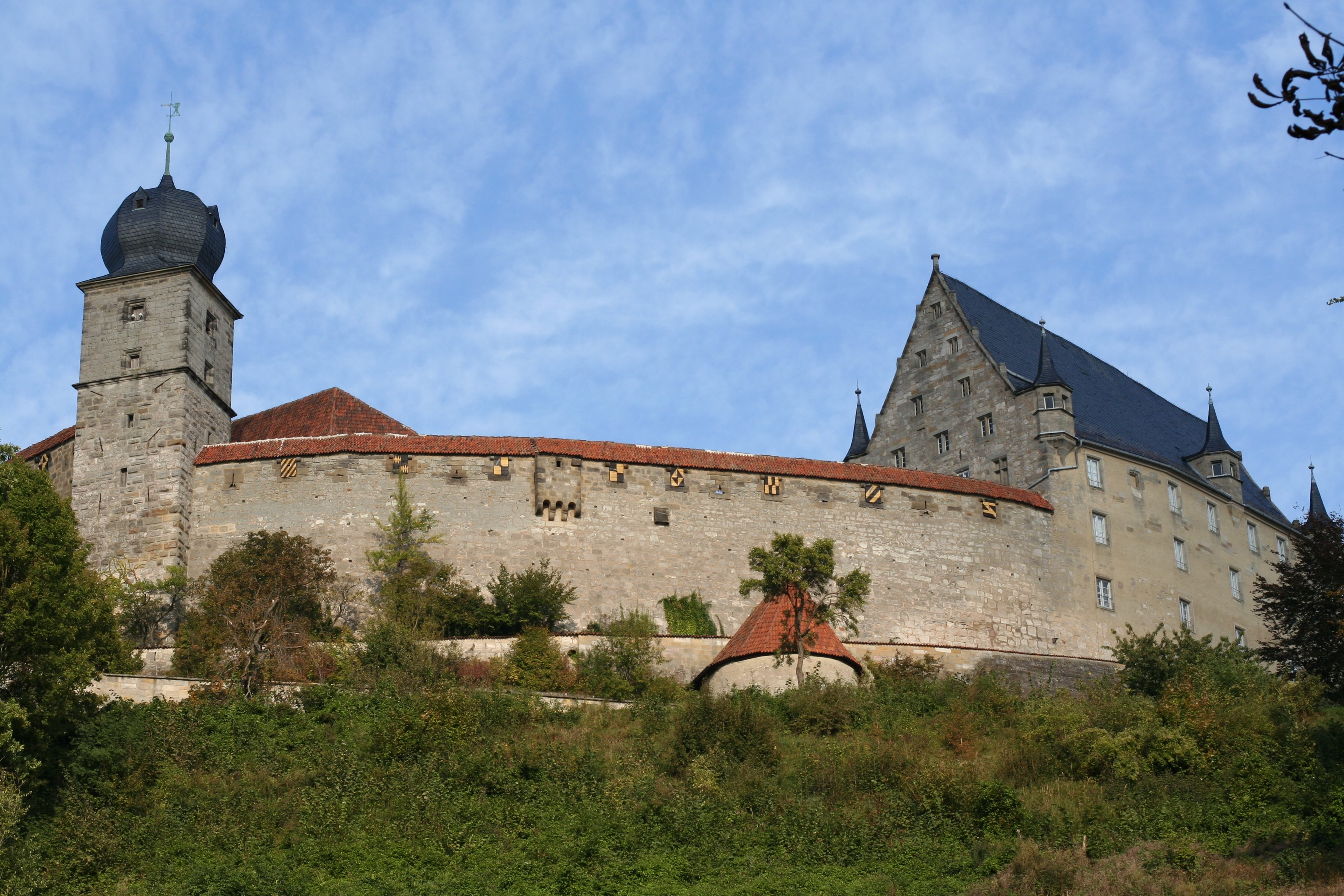 Veste Blick aus Hofgarten, Coburg (Germany)